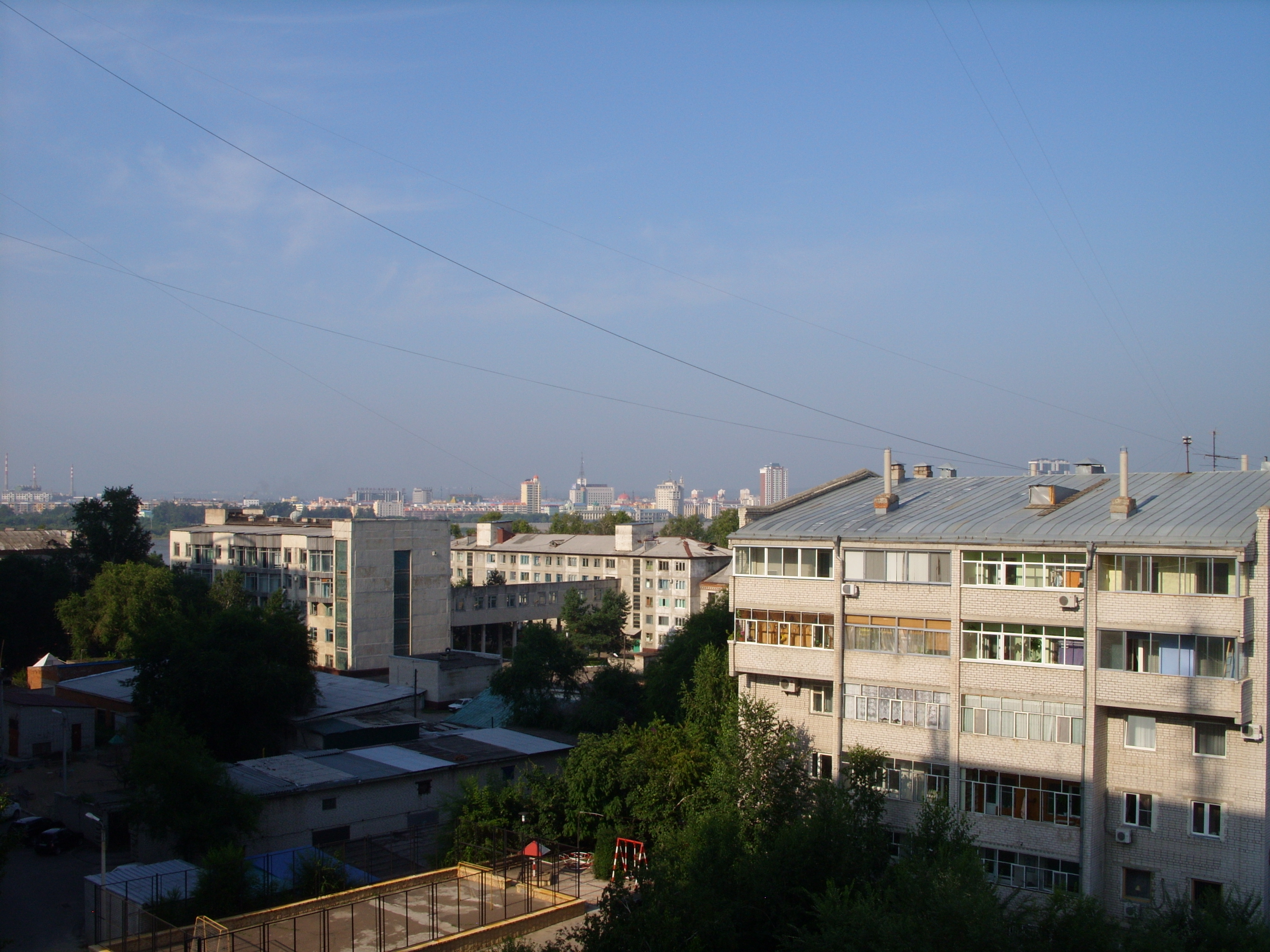 Снимки августа 2011 г.